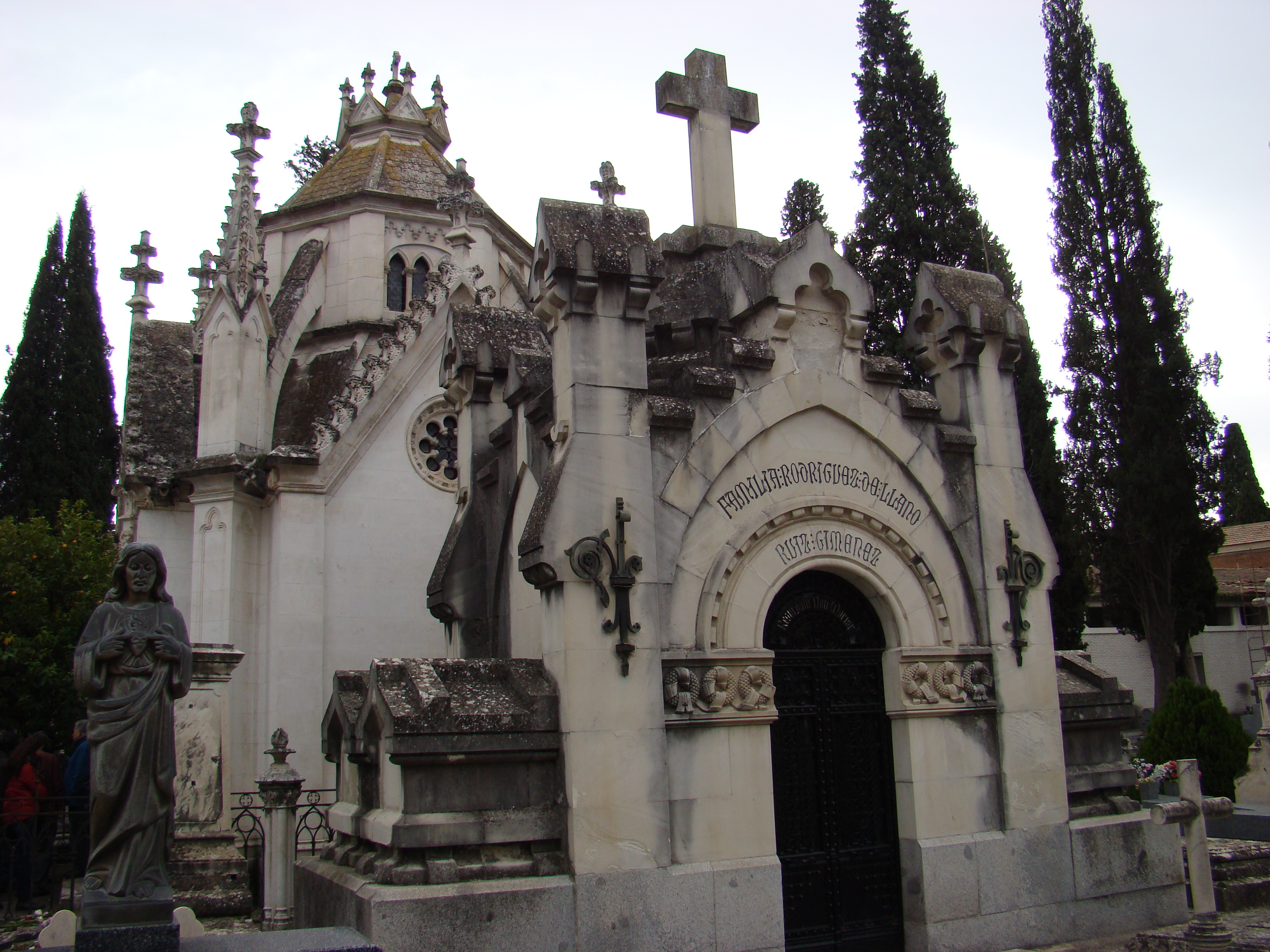 "el de la familia Rodríguez de Llano-Ruiz Giménez, de fecha aproximada al anterior (1890), obra muy personal de Enrique Fort y Guyenet" "En su interior conserva decoración escultórica de los talleres Romanelli de Florencia: gran urna de mármol coronada por una copia reducida del Cristo de Santa Maria sopra Minerva de Miguel Ángel. Desgraciadamente, hace mucho que desapareció el ángel de bronce que lo remataba, al igual que la ornamentación pictórica de su bóveda, obra de Arturo Mélida Alinari." (EL CEMENTERIO DE LA SACRAMENTAL DE SAN JUSTO: HISTORIA Y ARQUITECTURA Por CARLOS SAGUAR QUER) DSC00367